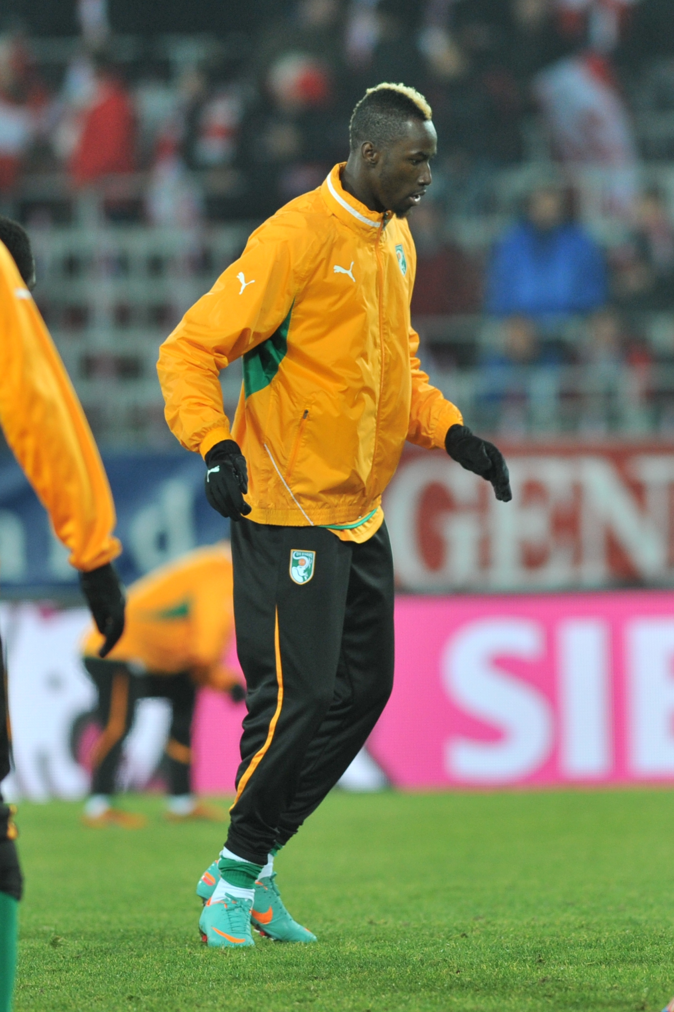 ÖFB freundschaftliches Länderspiel - Österreich vs Elfenbeinküste am 14. November 2012 The making of this work was supported by Wikimedia Austria. For other files made with the support of Wikimedia Austria, please see the category Supported by Wikimedia Österreich. Elfenbeinküste Nr. 18: Lacina Traoré